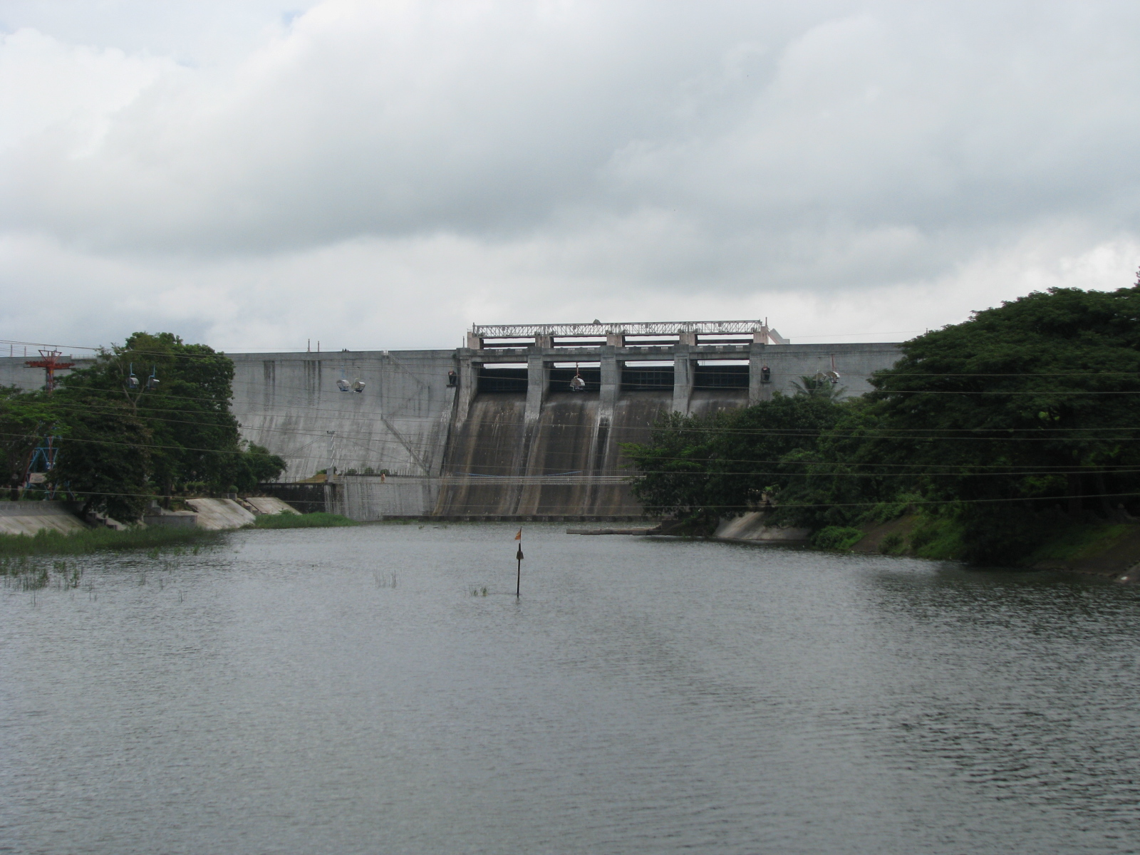 മലമ്പുഴ ഡാമിന്റെ ചിത്രം